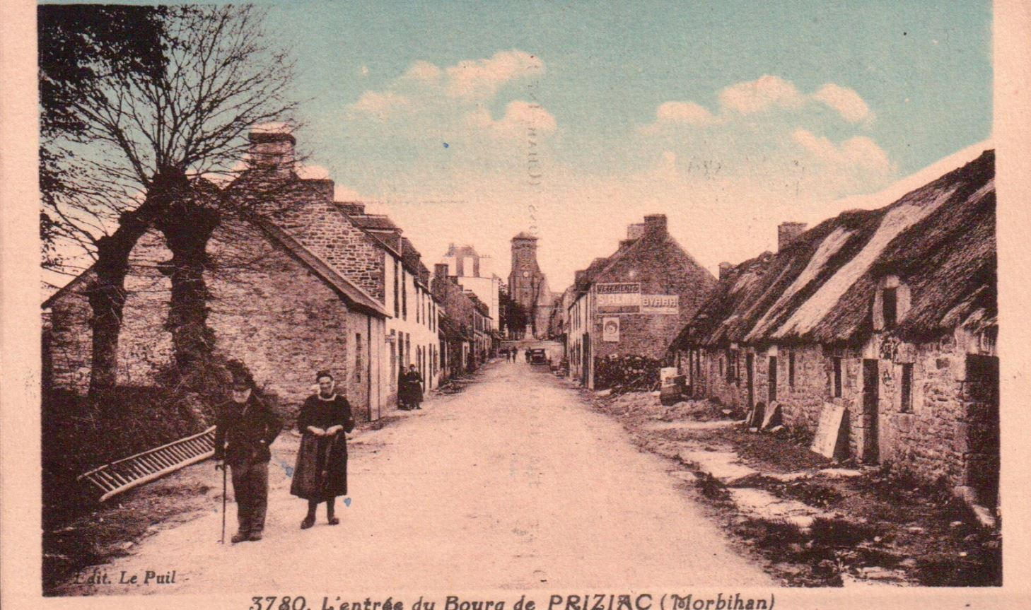 Carte postale ancienne du bourg de Priziac (éditeur de cartes postales Le Puil)